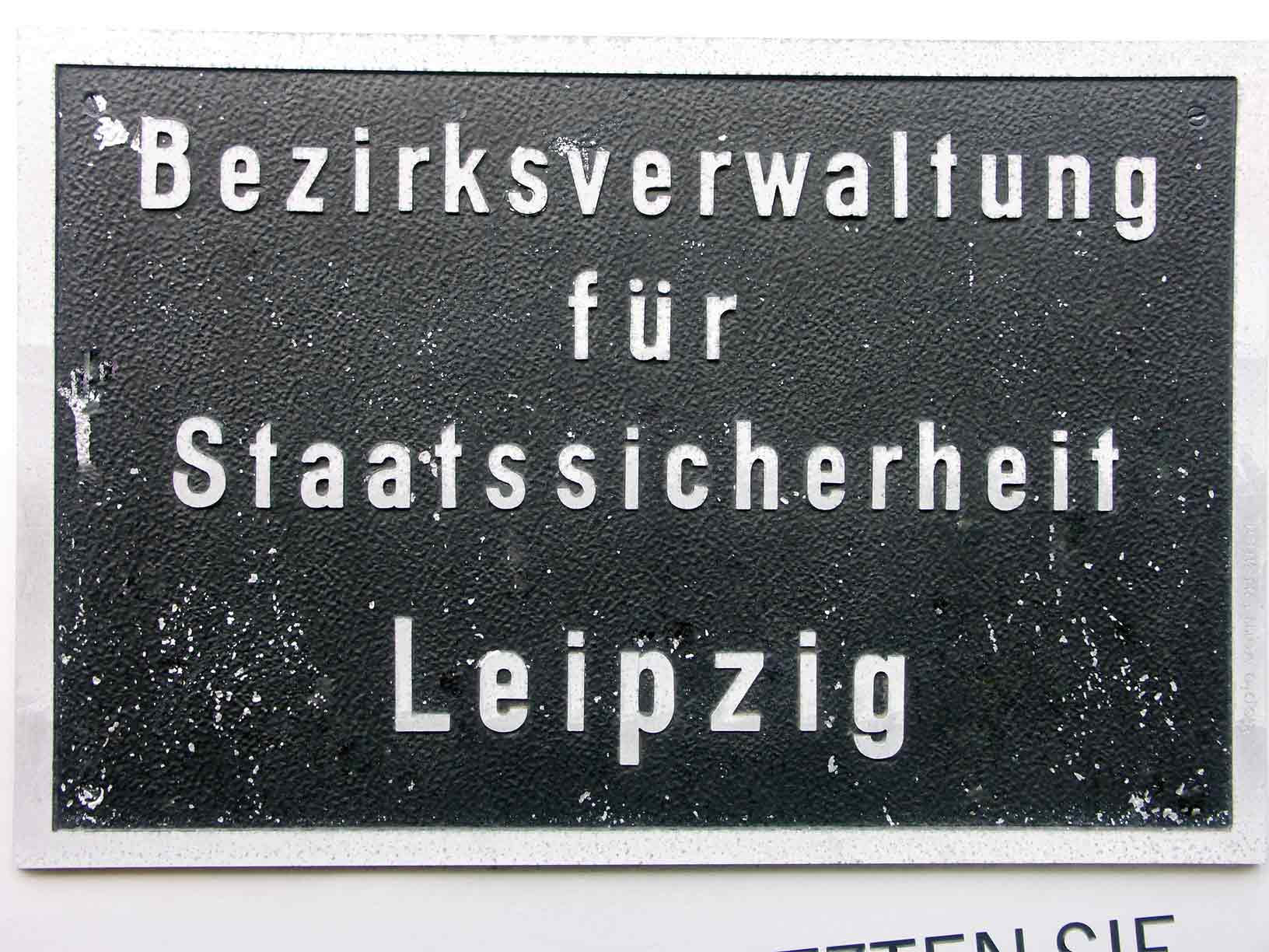 Amtsschild der MfS Bezirksverwaltung Leipzig, Museum Runde Ecke, Leipzig Dittrichring; eigenes Foto 24-02-2006